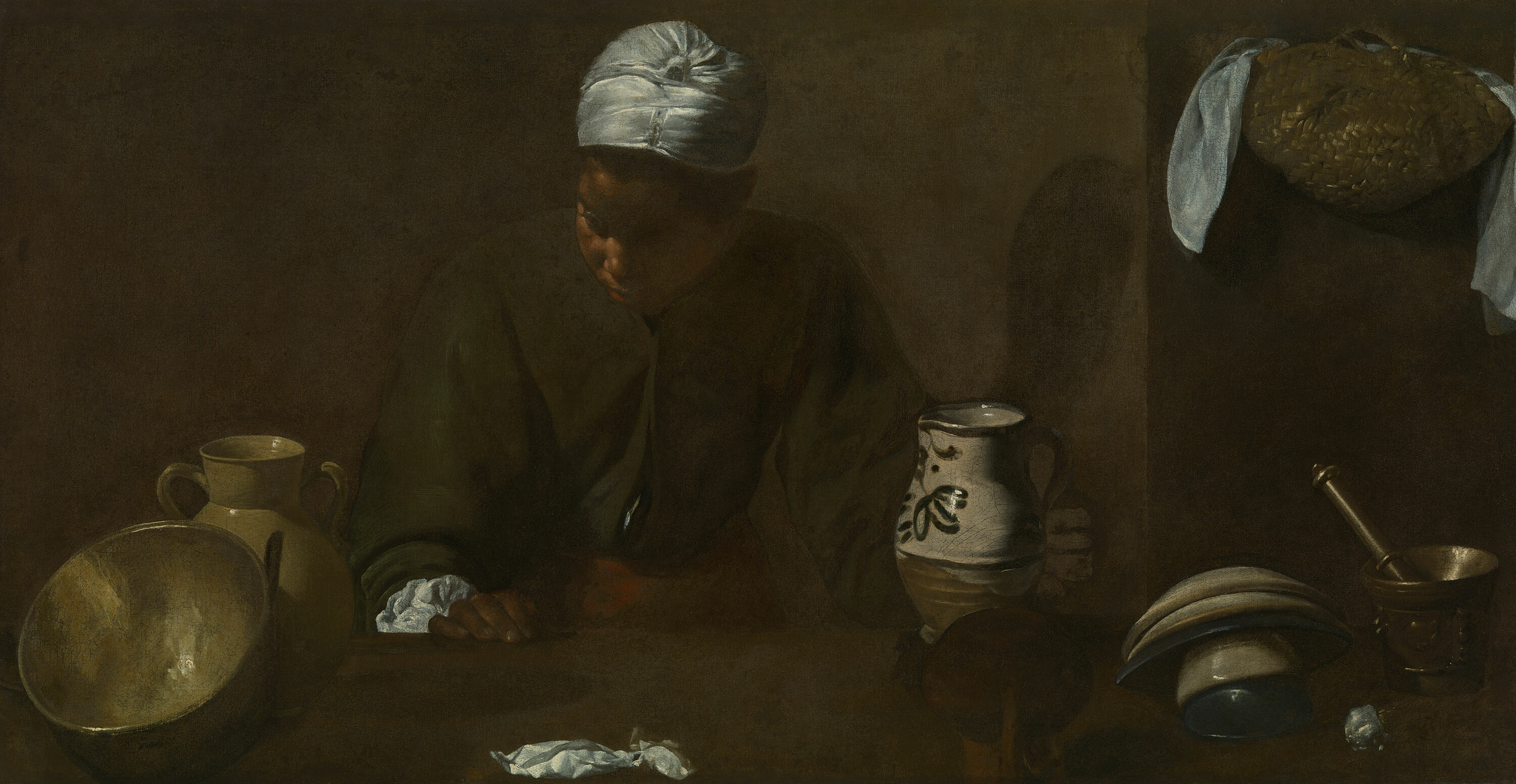 Velázquez: La cocinera. Chicago, The Art Institute.